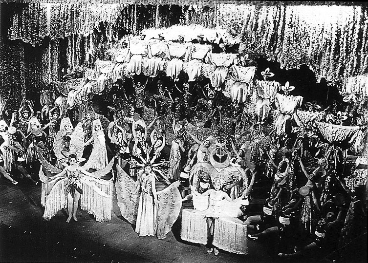 大阪松竹座にて、松竹楽劇部（後のOSK）による「春のおどり」フィナーレ